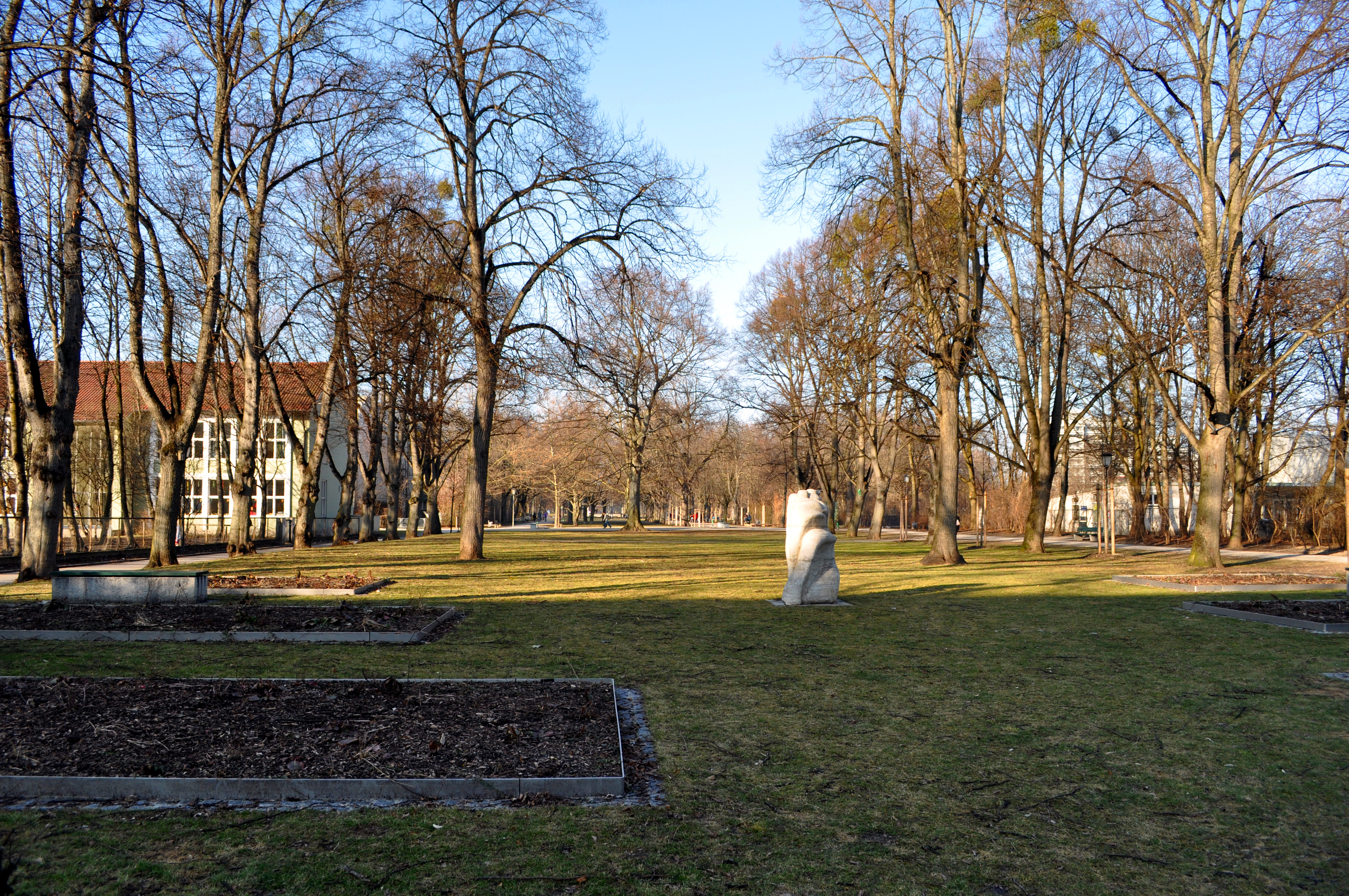 Südlicher Teil des Bayernparks in München-Schwabing, Blick Richtung Norden